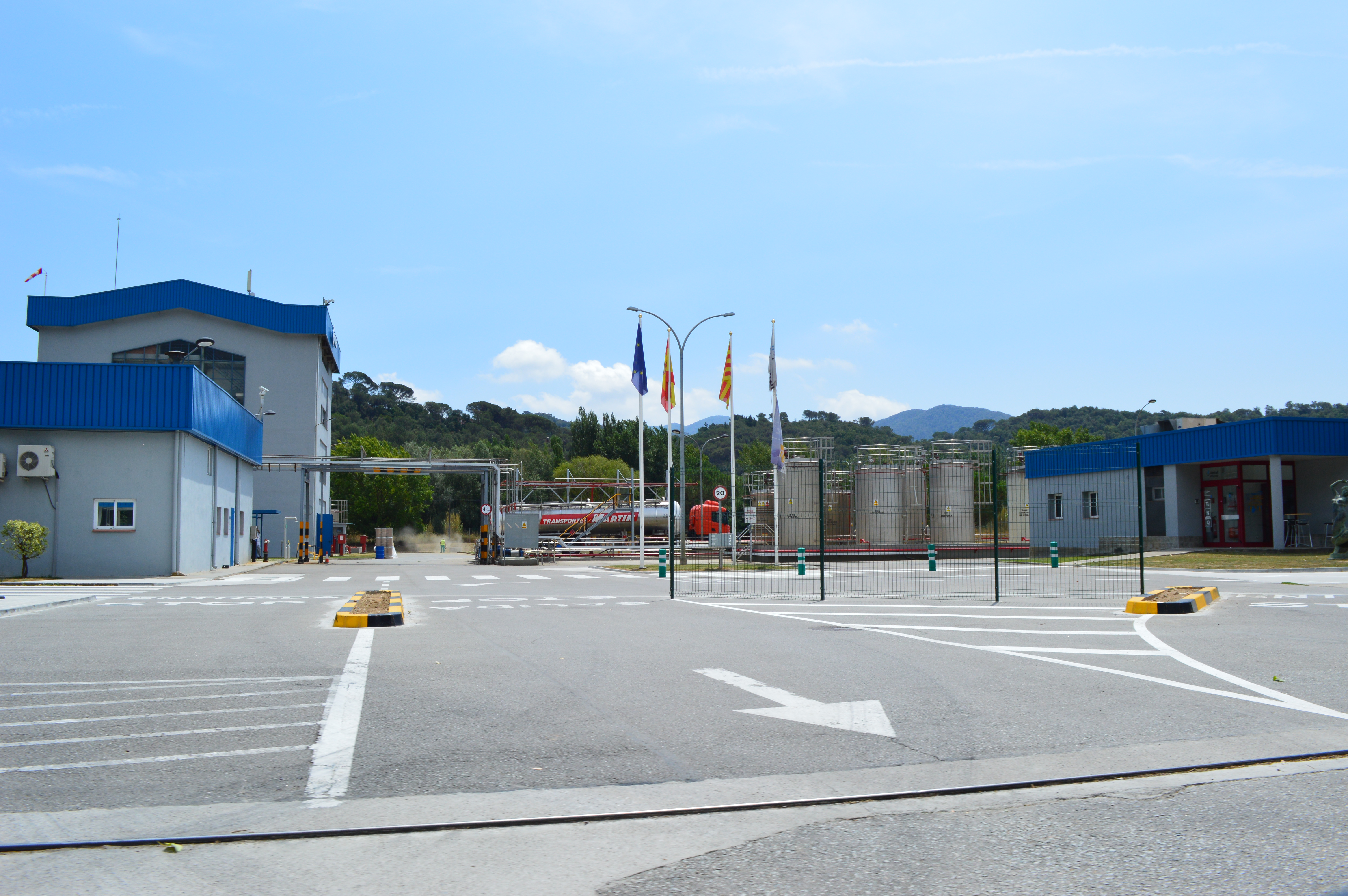 L’empresa farmacèutica Almirall, amb planta química a Sant Celoni (Ranke Química, SL).